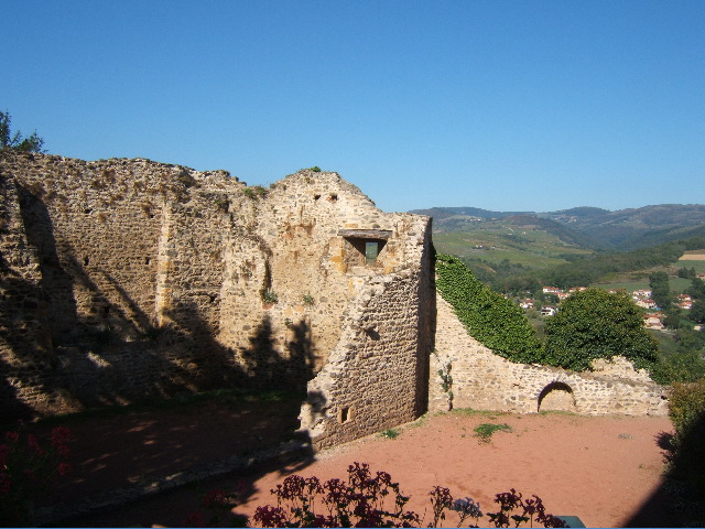 Ruines du château de Ternand, dans le Beaujolais (France)